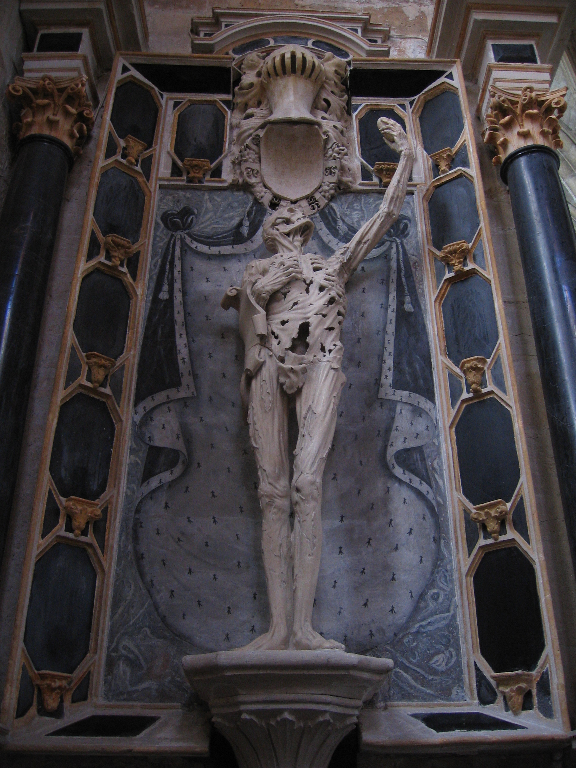 Situé à Bar-le-Duc dans l'église Saint Etienne